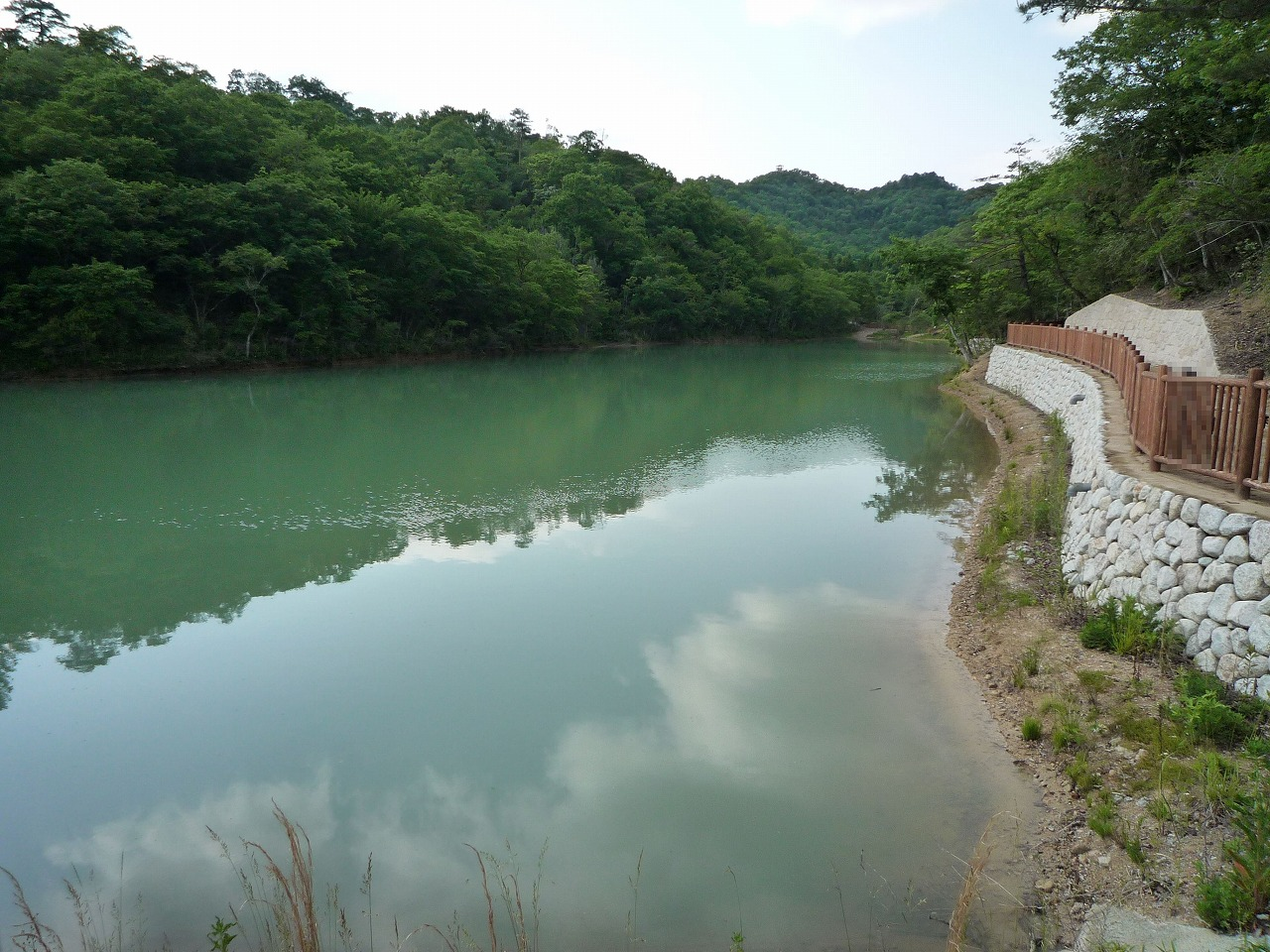 兵庫県立宝塚西谷の森公園の保与谷池。